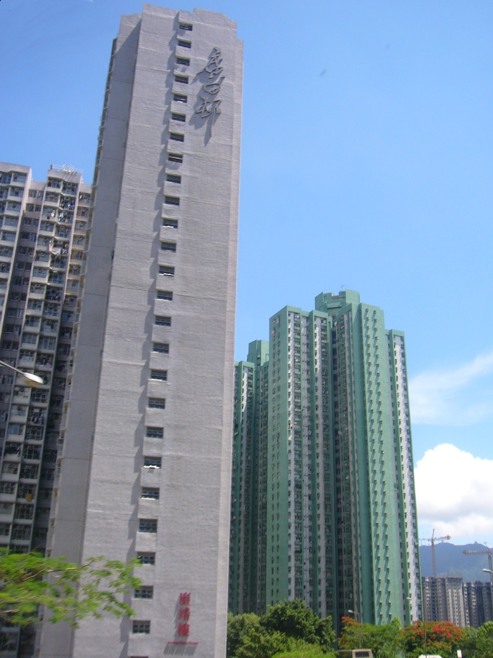 Kwong Tin Estate, Hong Pak Court